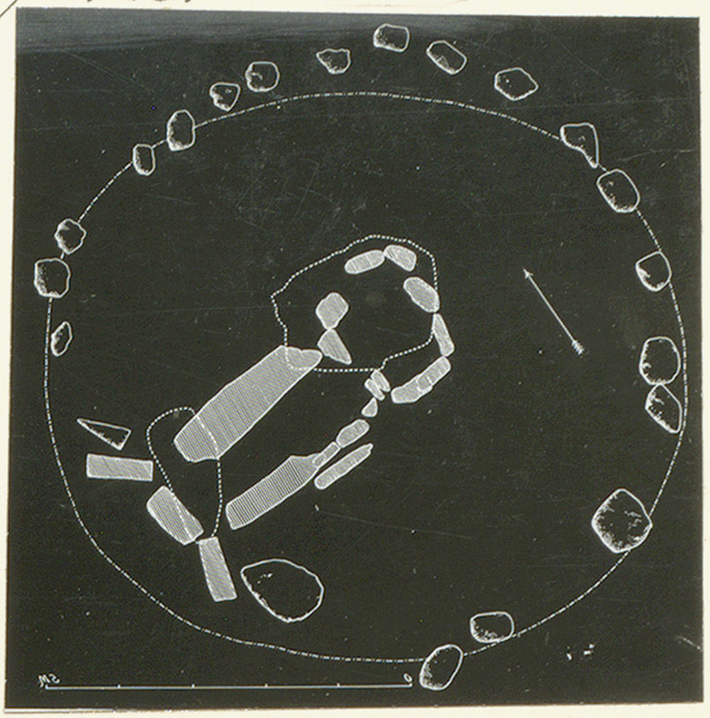 Raä-nr: Skee 173:1. Stenkammargrav/gånggrift. Foto. Motiv: Skee 173:1 Kategori: Stenkammargrav Raä-nr: Skee 173:1. Stenkammargrav/gånggrift. Foto. Skee 173:1.